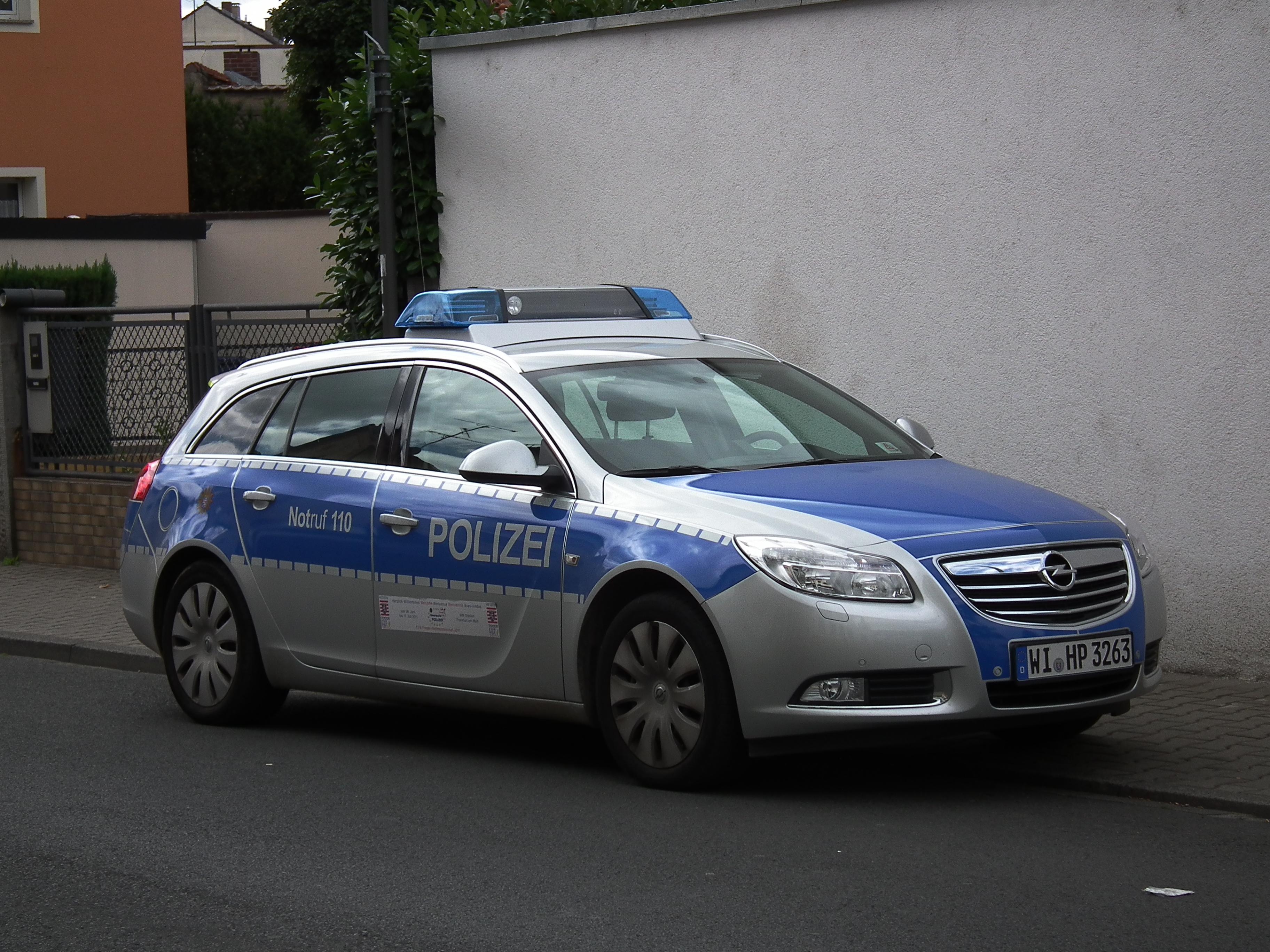 Polizeifahrzeug, fotografiert in Offenbach-Bürgel (Hessen, Deutschland)